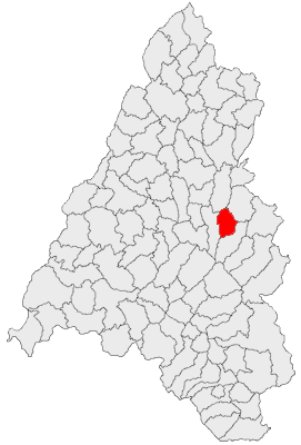 Categorie:Hărţi ale judeţului Bihor